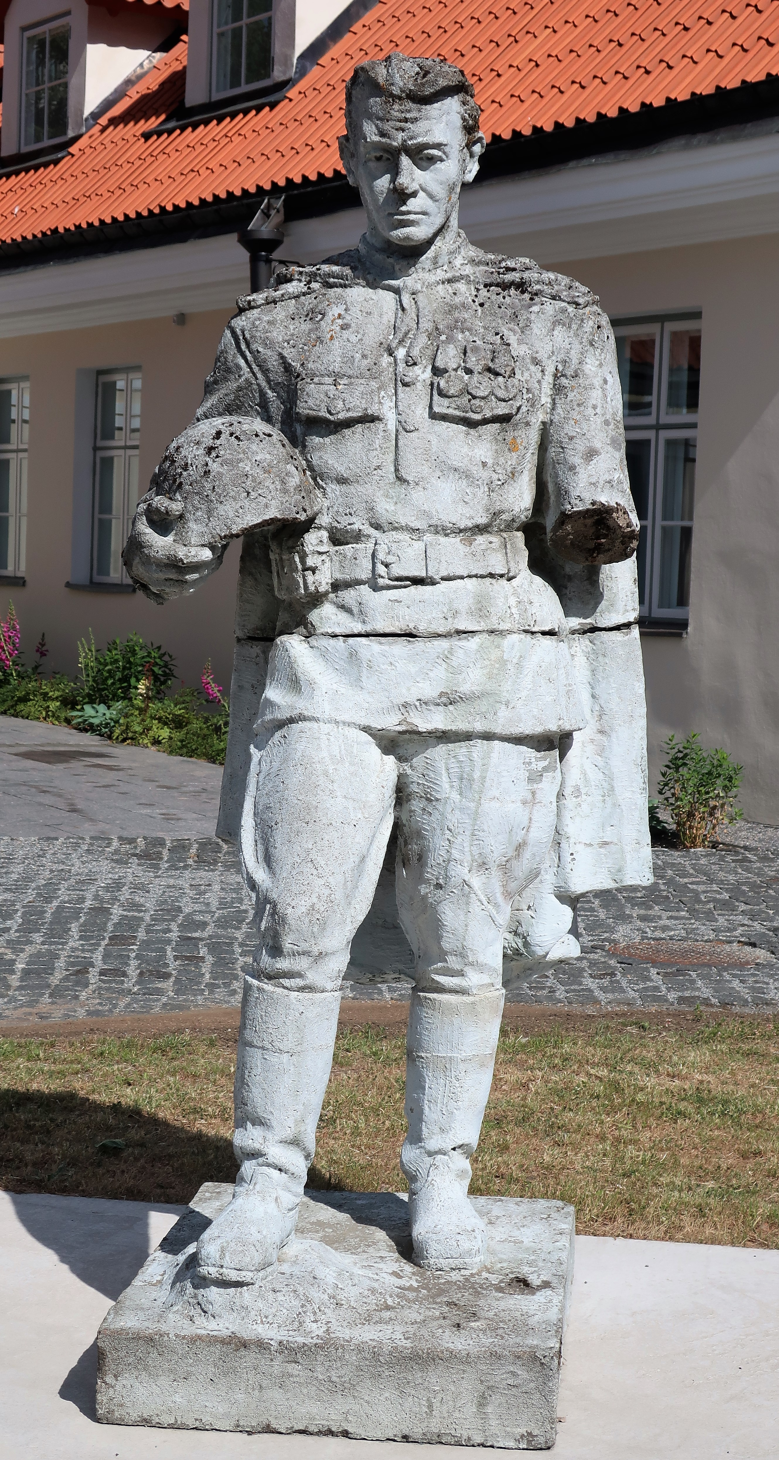 Kuva Enn Roosin luonnoksesta Pronssisoturi muistomerkkiin (1947) Tallinnan Viron historiallisen museon Maarjamäen kartanon takana